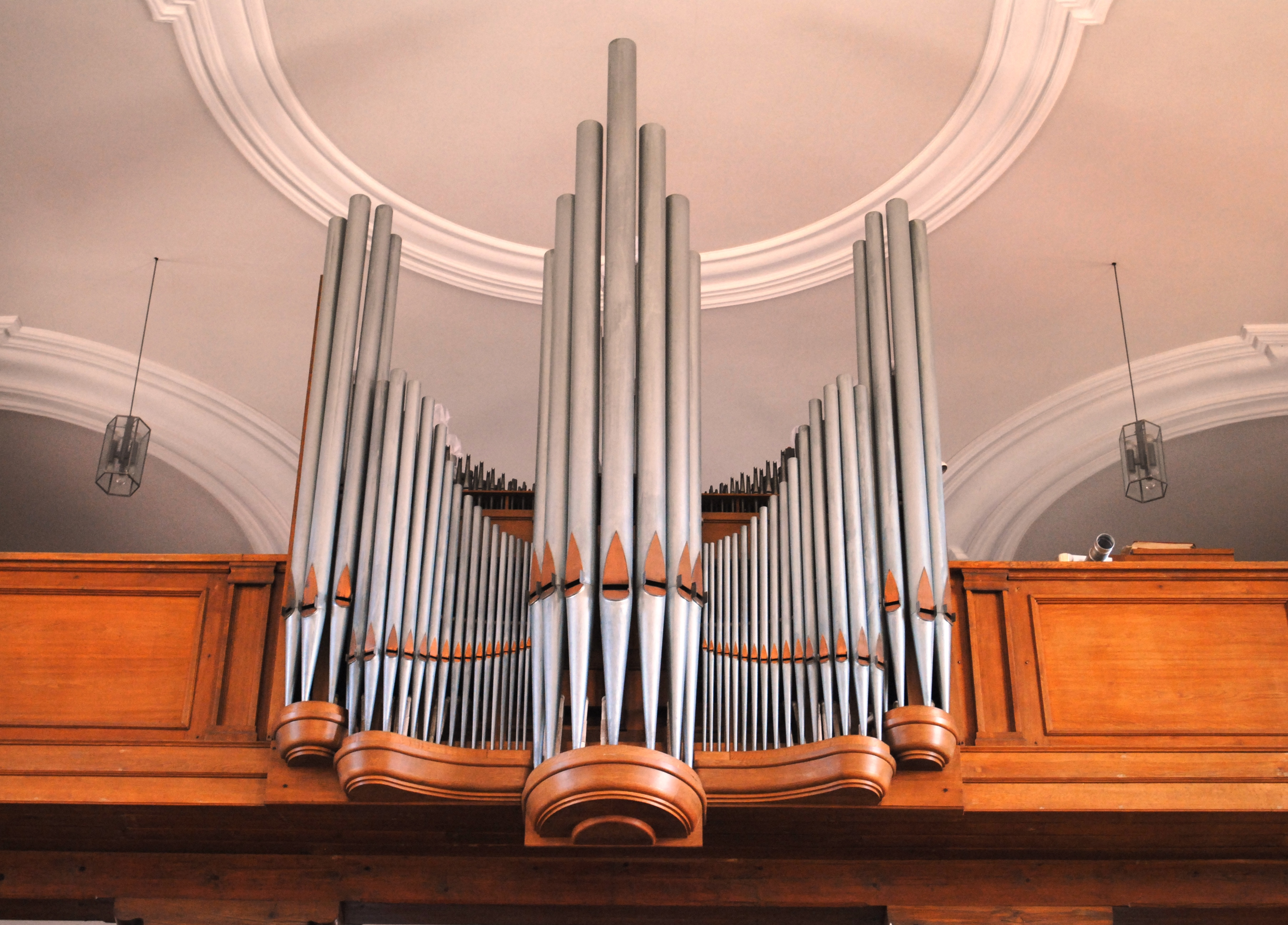 Orgel, St. Martin Willanzheim